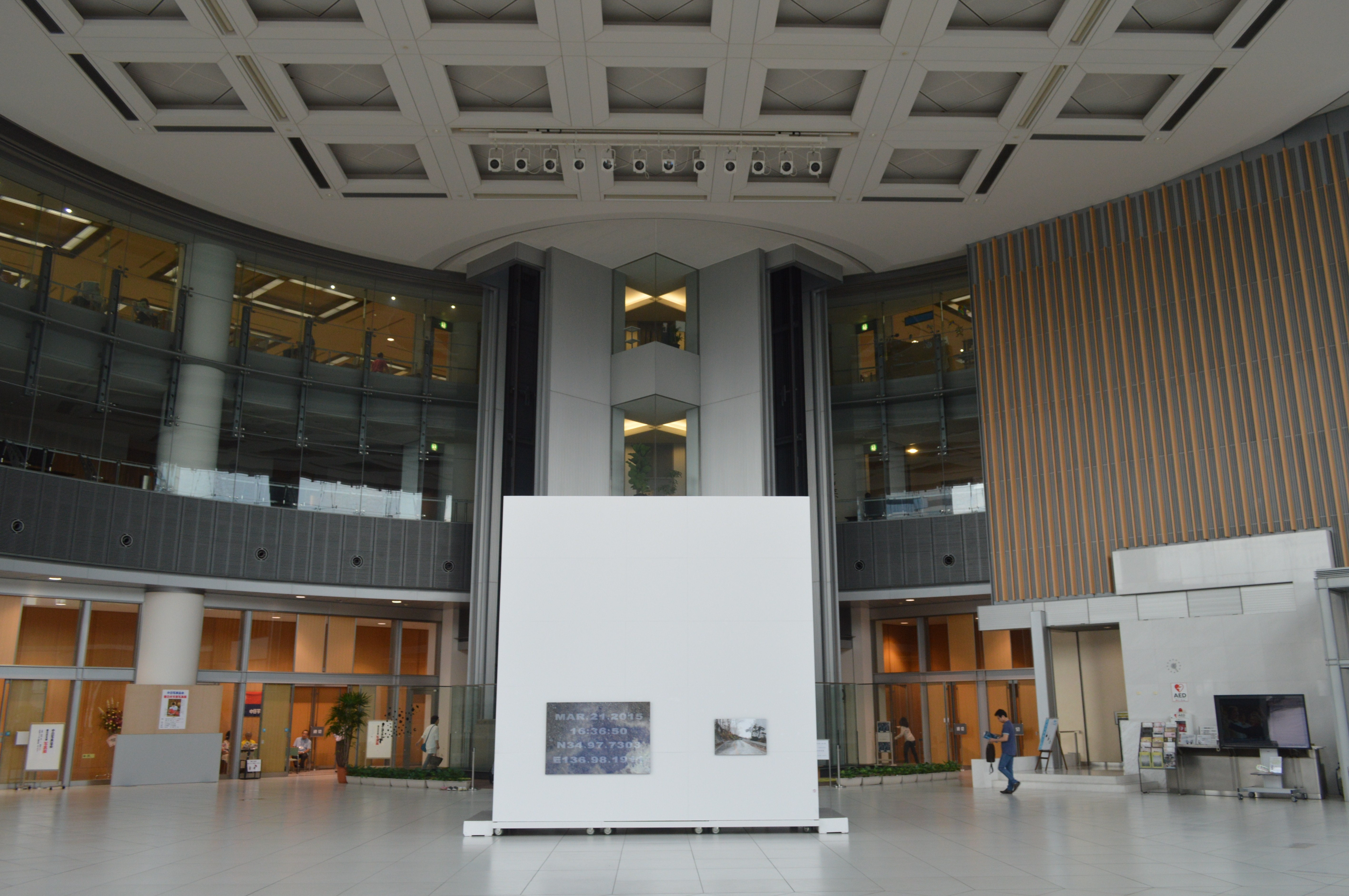 愛知県春日井市の文化フォーラム春日井内部。春日井市図書館を内包。